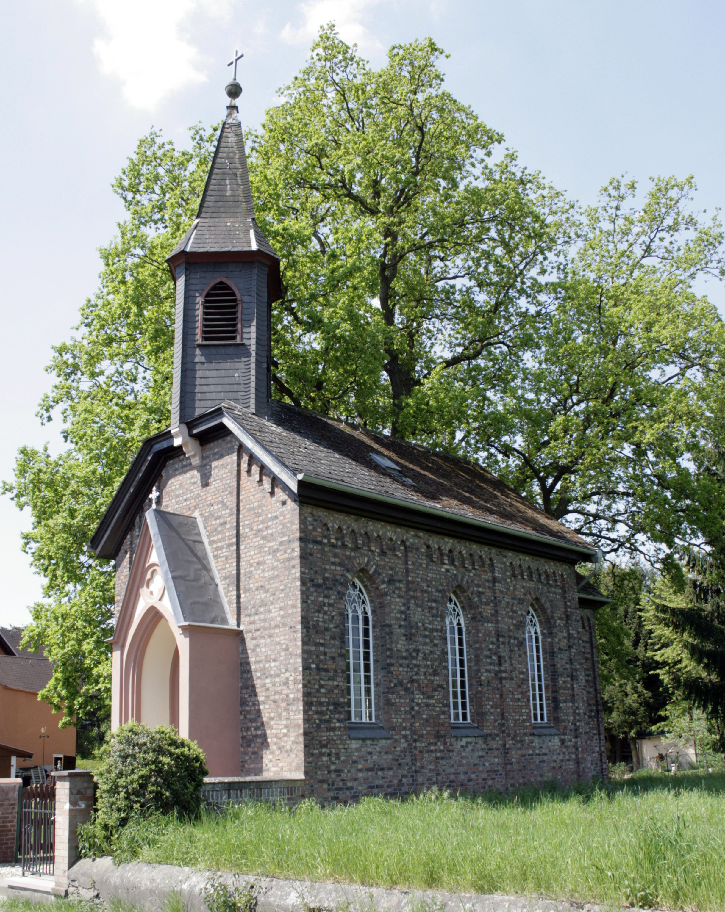 St.-Anna-Kapelle in Eschhofen, Deutschland